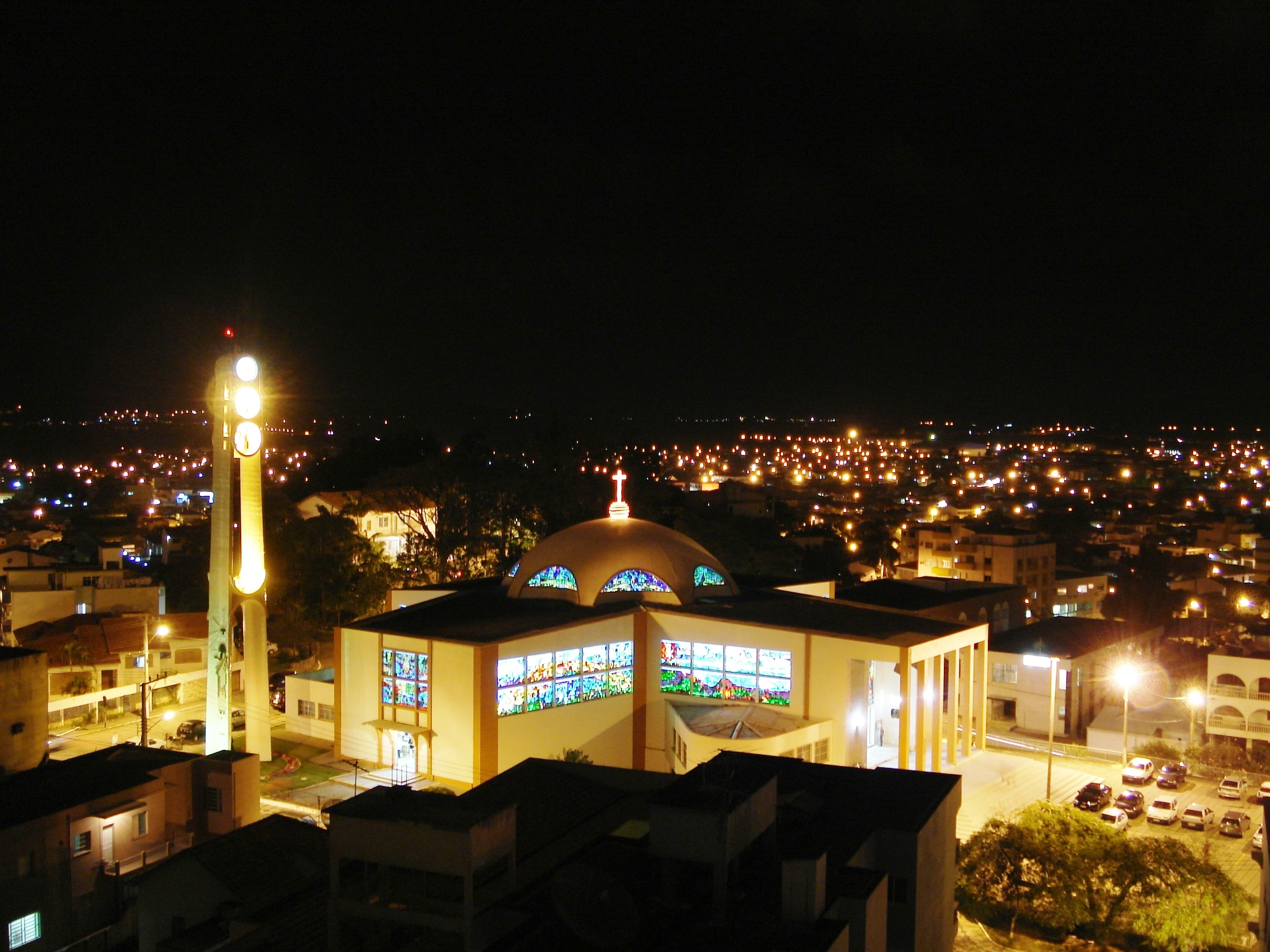 Catedral Diocesana de Tubarão